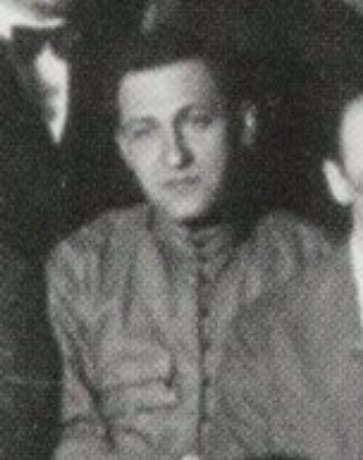 Erste Konferenz der OSA, 1928.